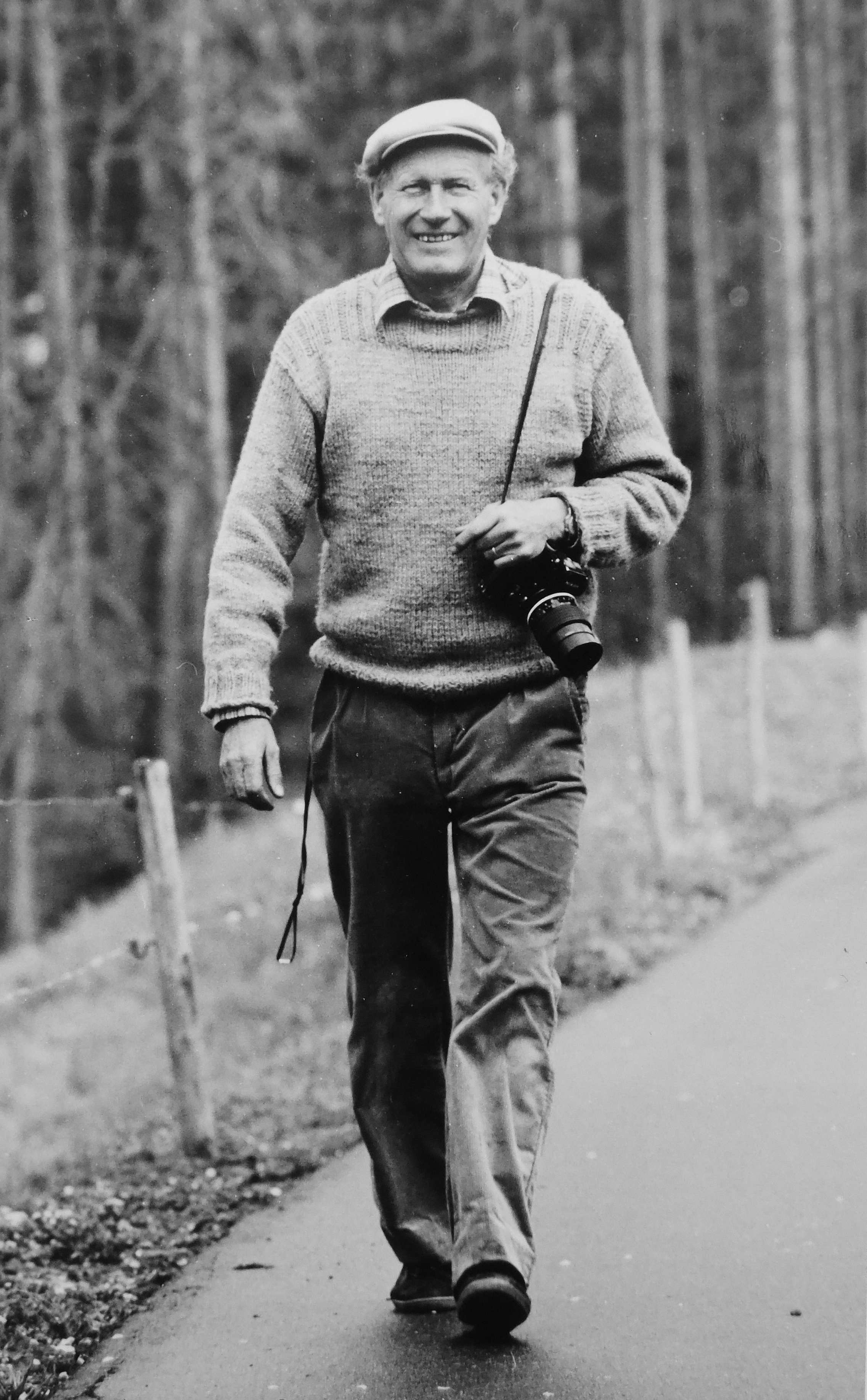 Wale im Wald